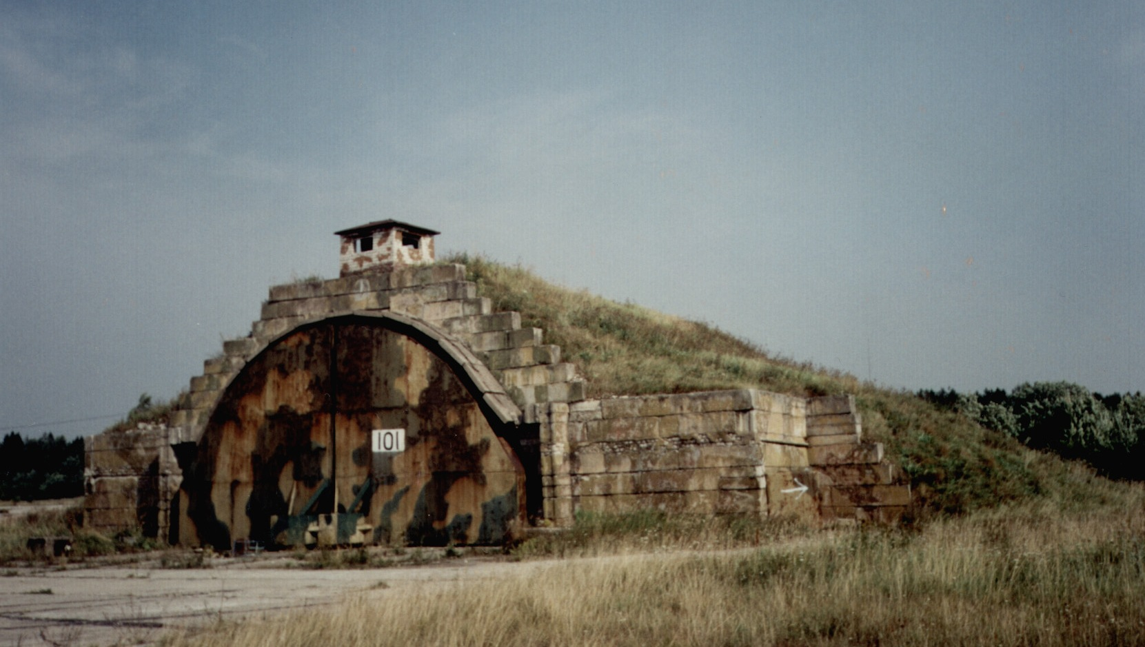 Арочное укрытие (капонир) на аэродроме Тапа (Эстония)